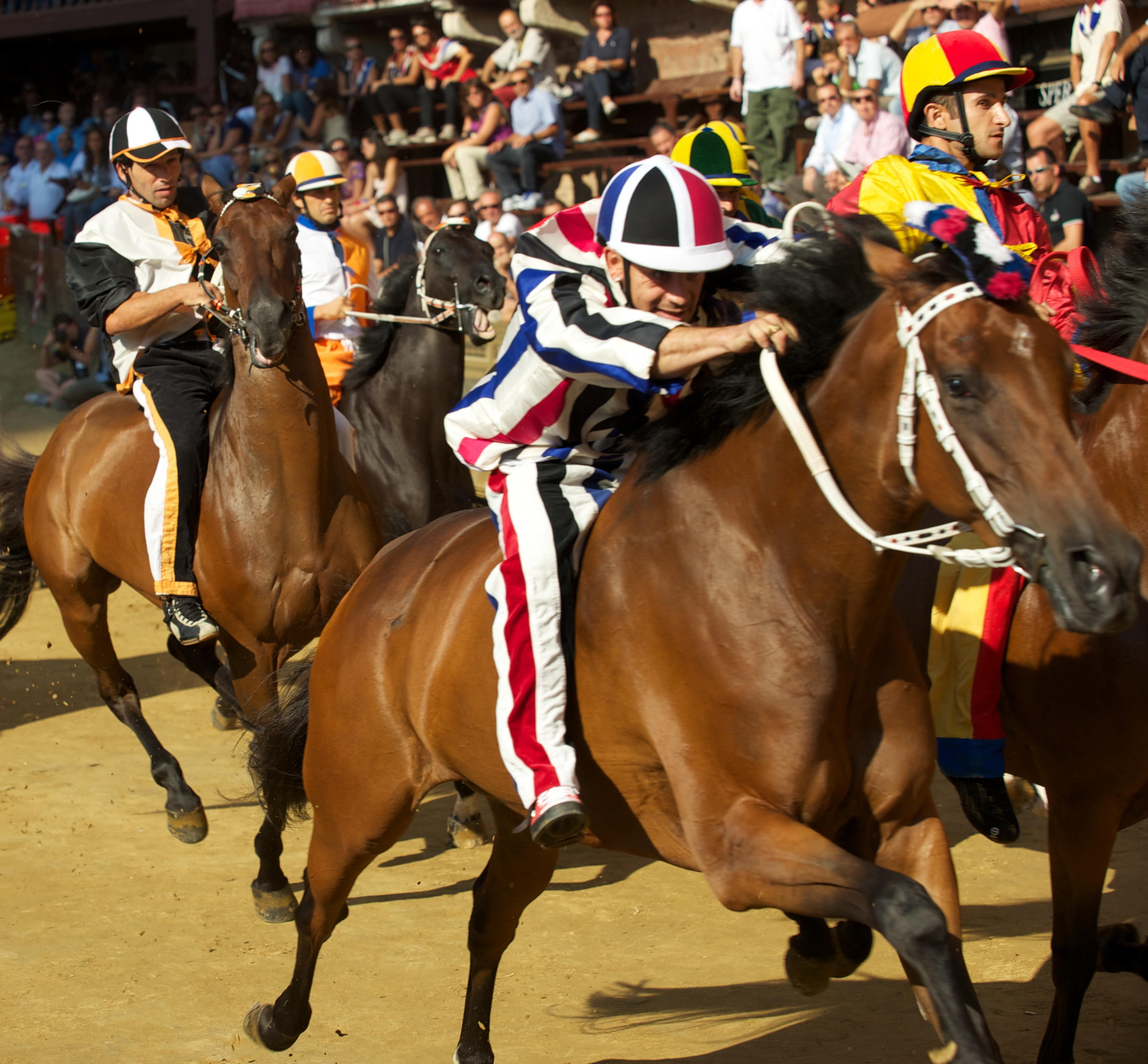 In azione l'Istrice con Voglia su Marrocula, dietro invece la rivale Lupa con Salasso su Moedi